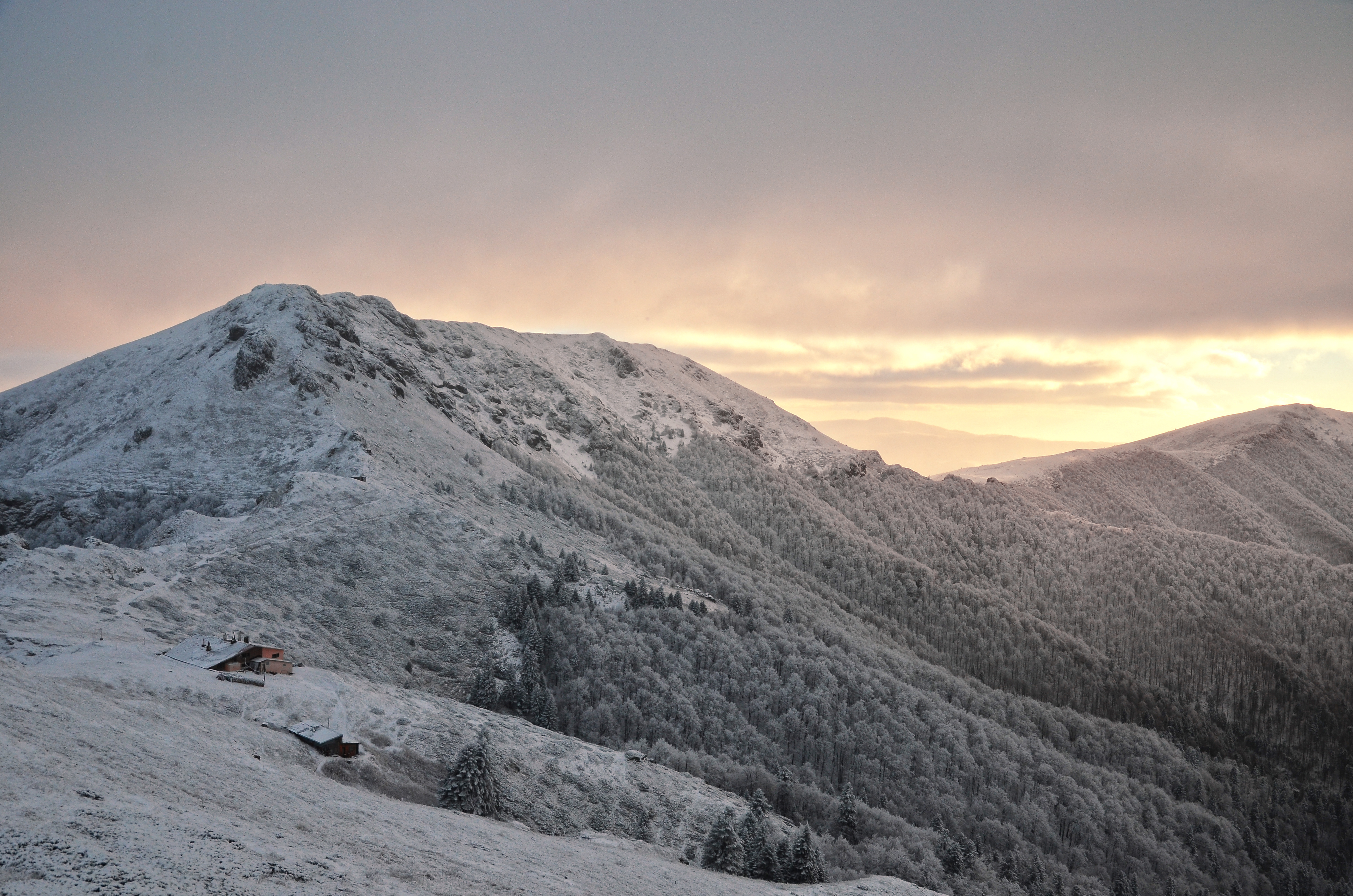 Царичина